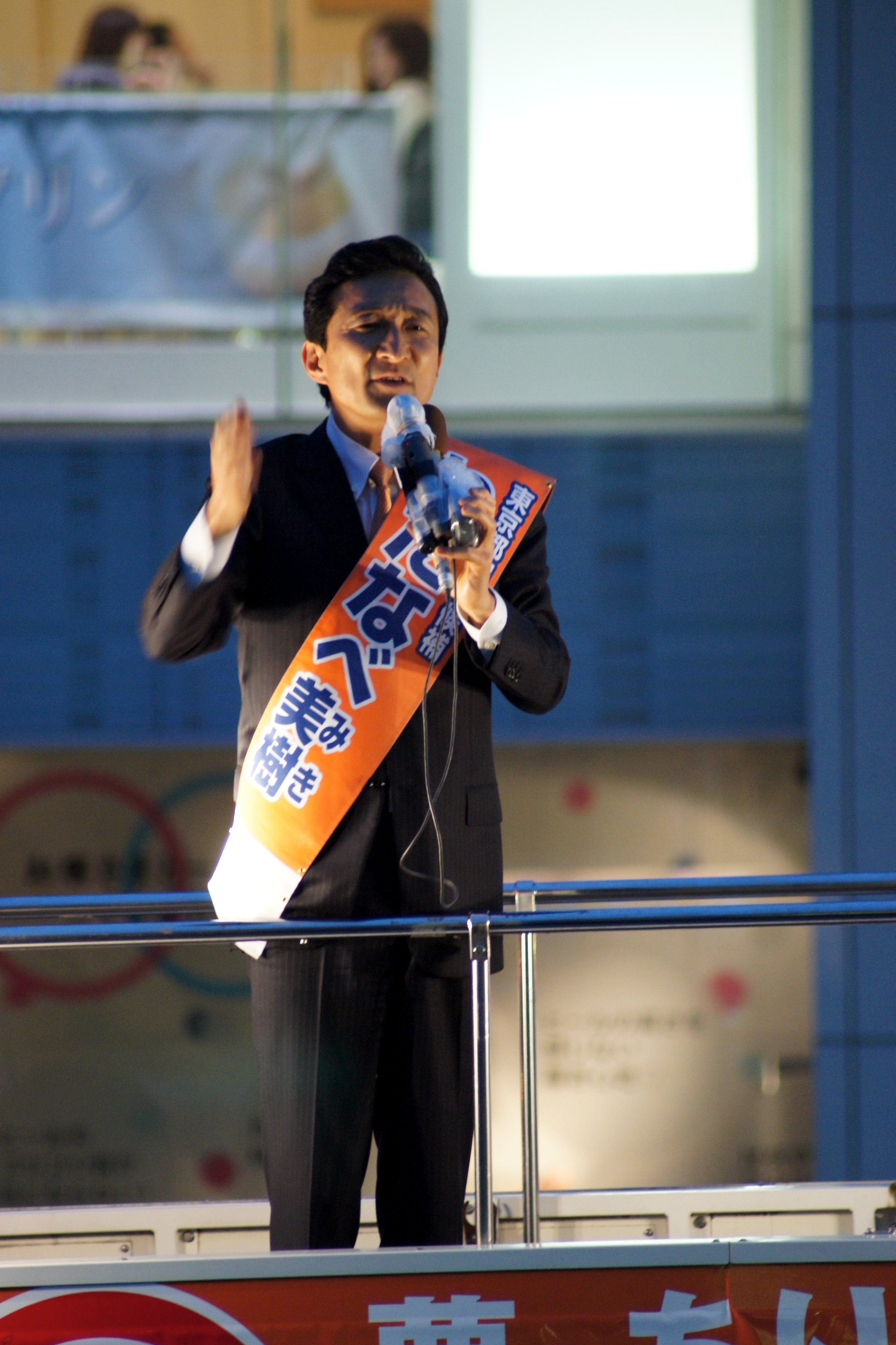 Politici in azione 18-08-25